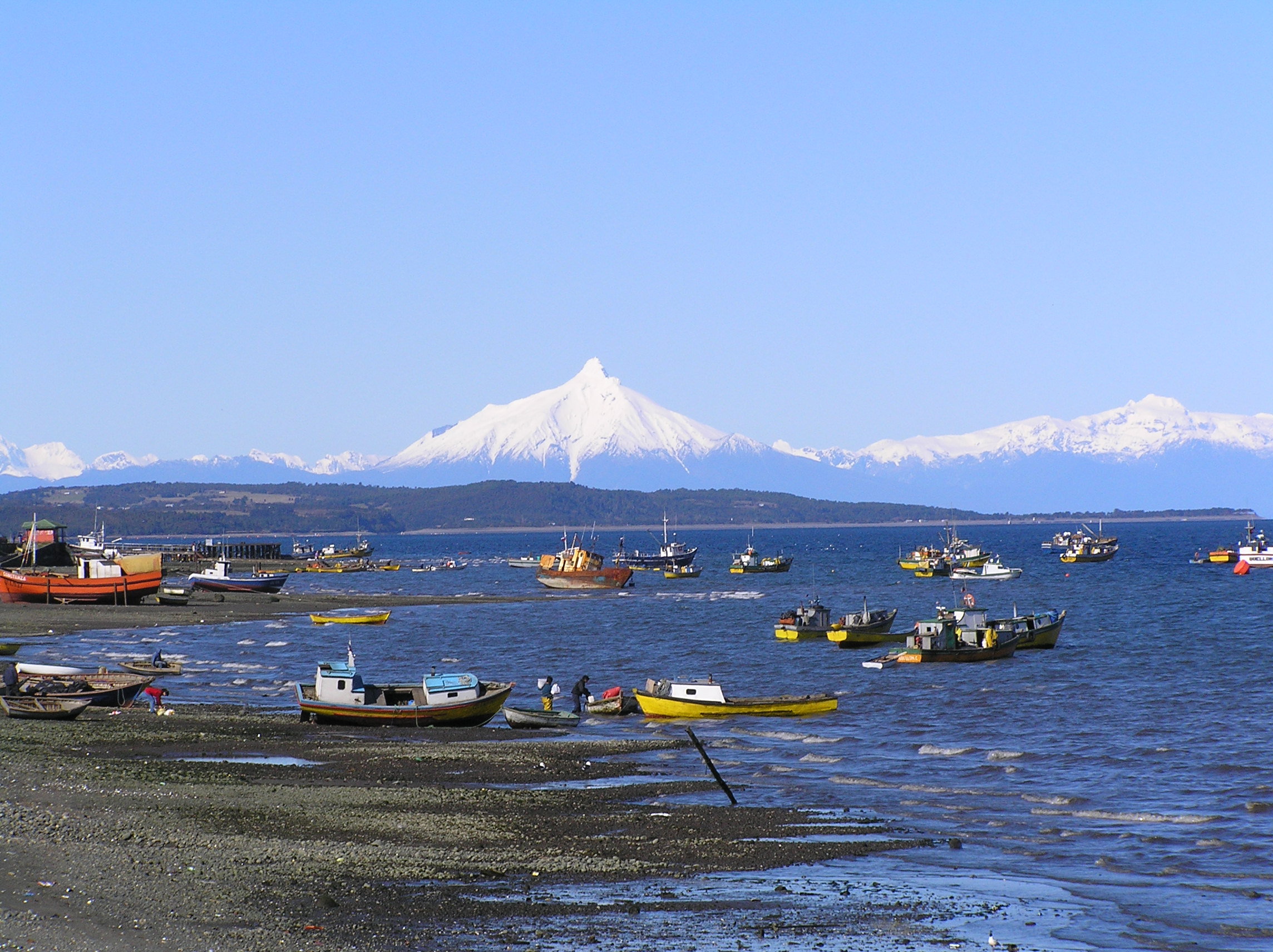 La costanera de Quellon